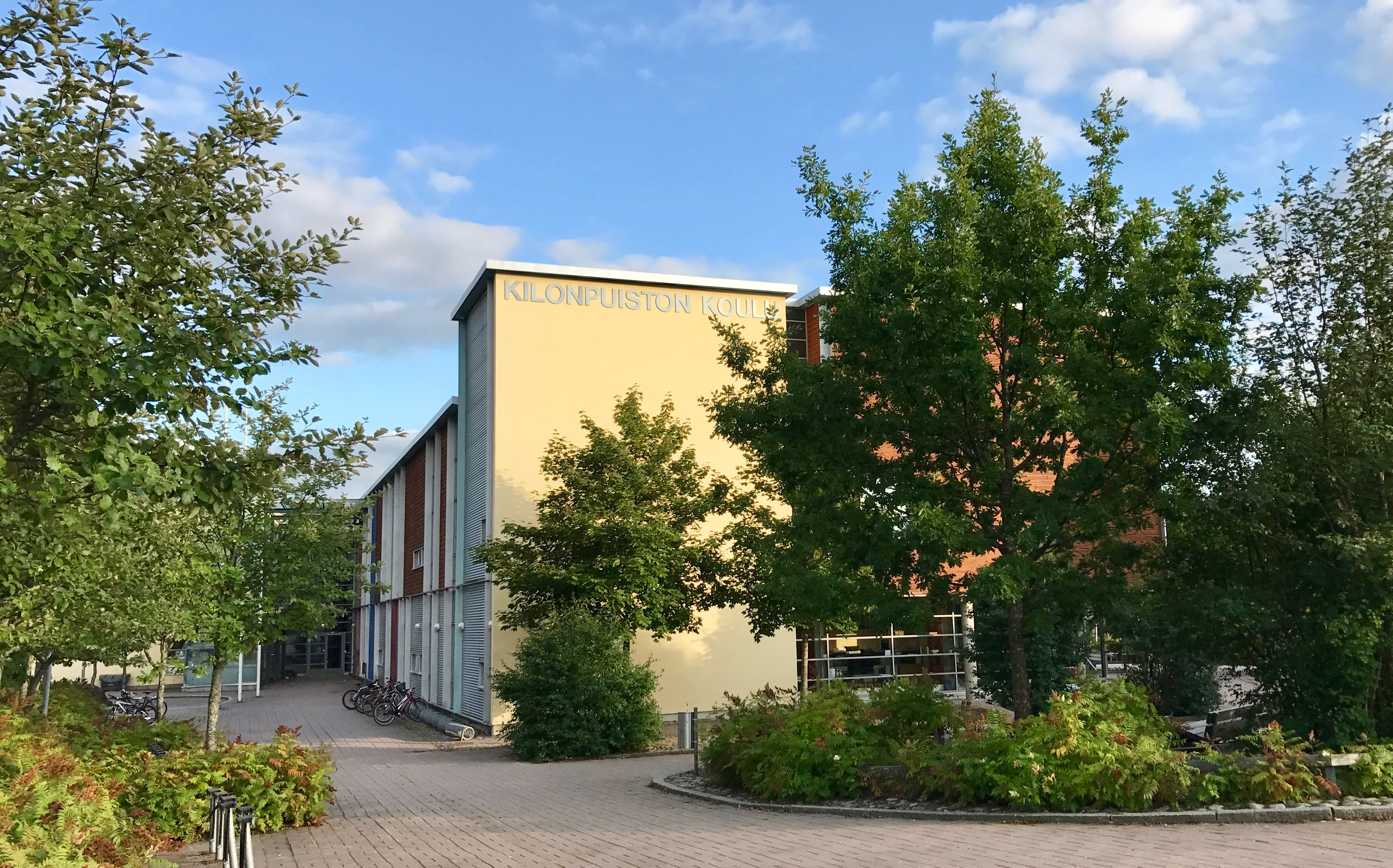 Kilonpuiston koulu Espoon Kilossa.